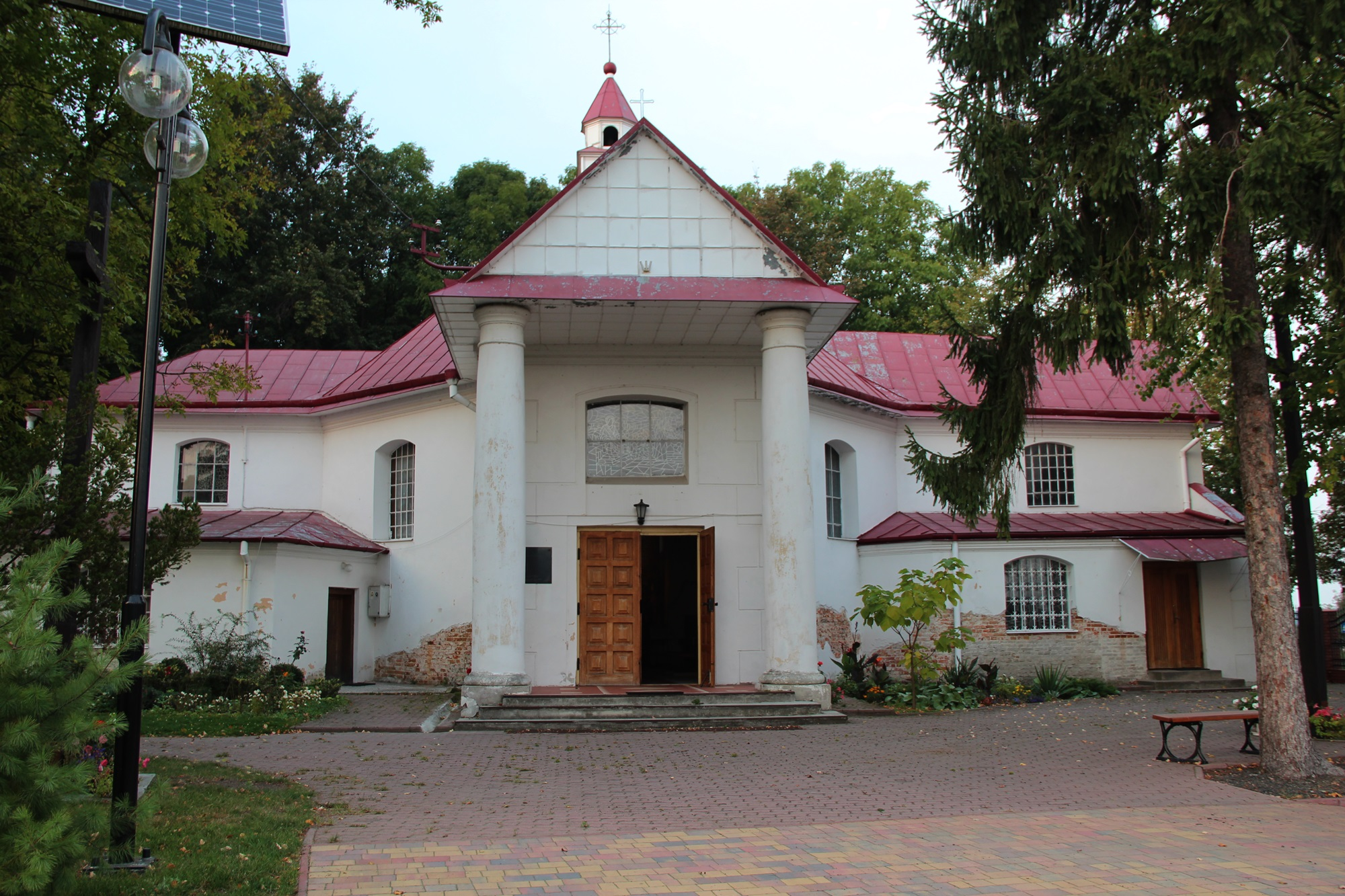 Stary Brus, cerkiew greko-kat., ob. kościół rzym.-kat. par. p.w. Matki Boskiej Częstochowskiej, pocz. XIX